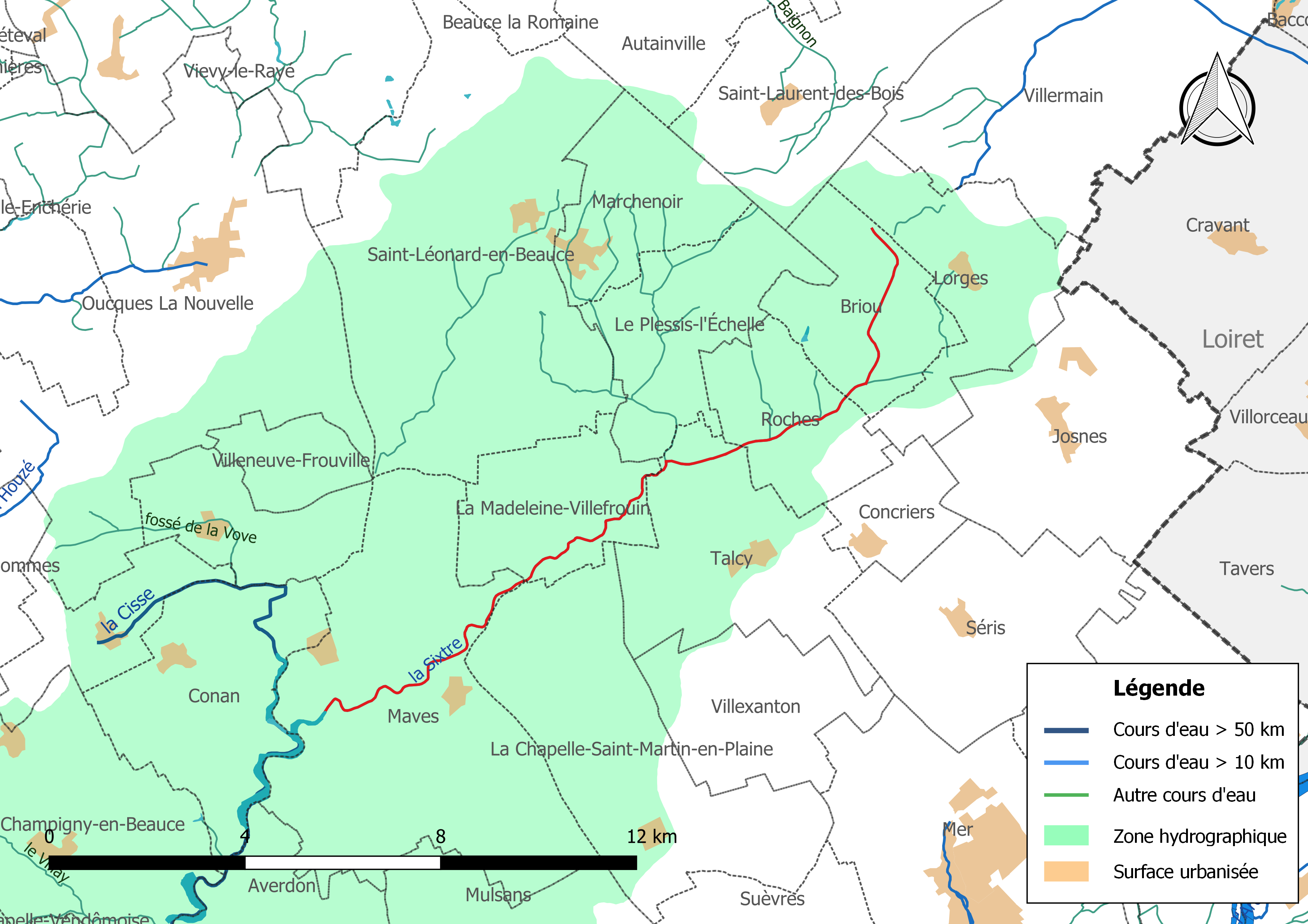 Carte du cours d'eau « la Sixtre » et de son bassin versant (zone hydrographique dans laquelle il s'insère).